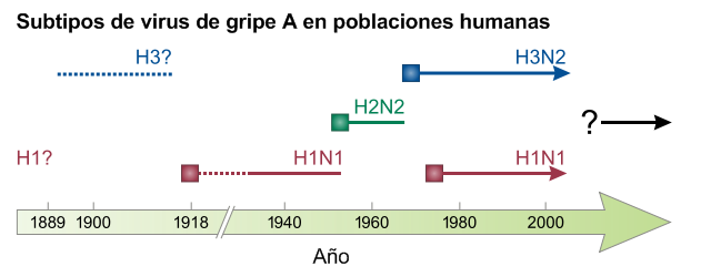 Las diversas cepas de influenza que han infectado la población humana durante el siglo XX. Datos provenientes de Palese P (December 2004). "Influenza: old and new threats". Nat. Med. 10 (12 Suppl): S82–7. PMID 15577936.